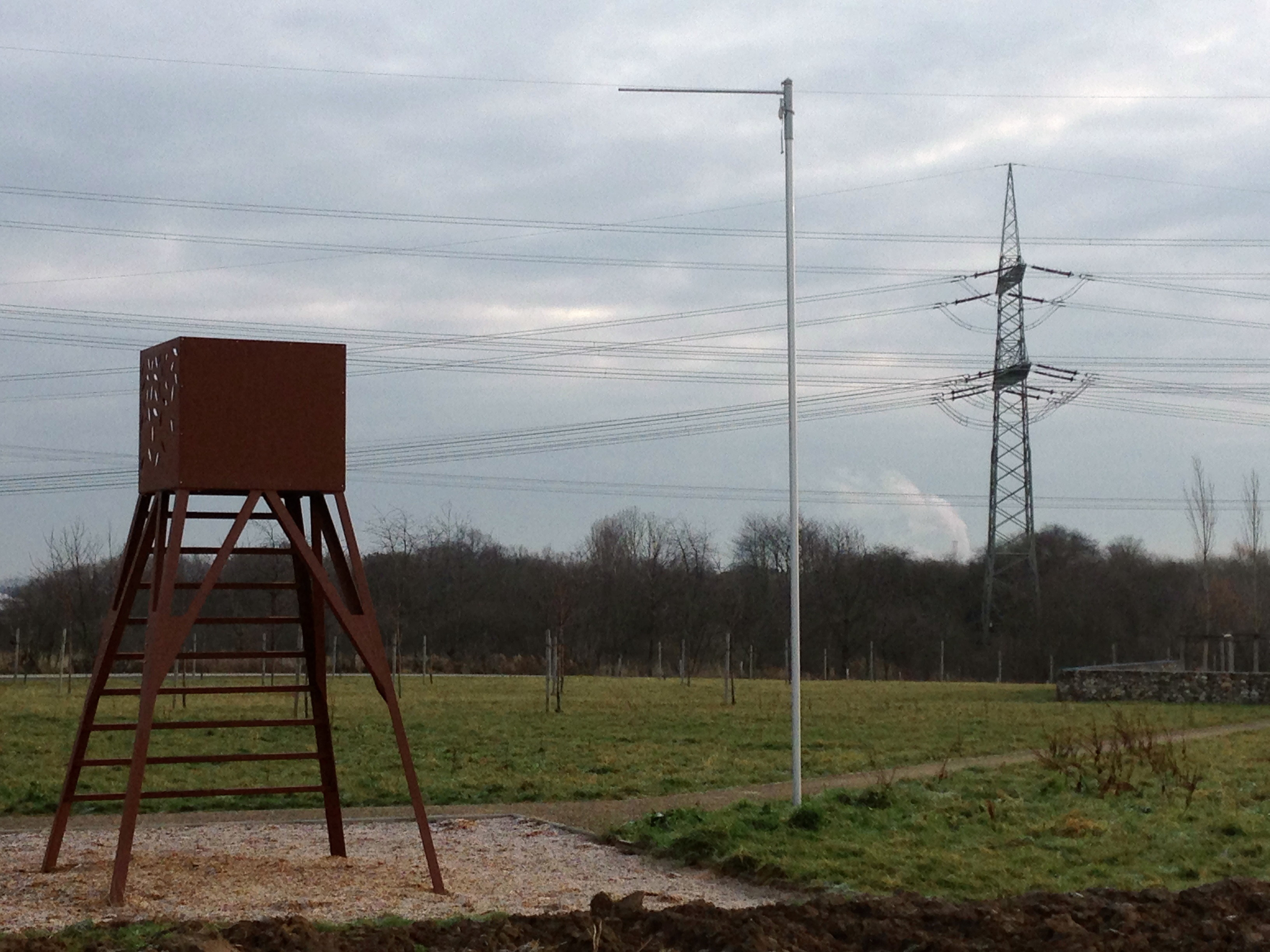 Landschaftstor Nucleus